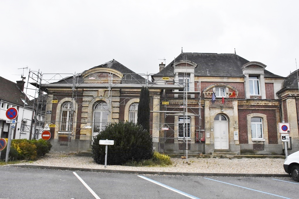 la Marie